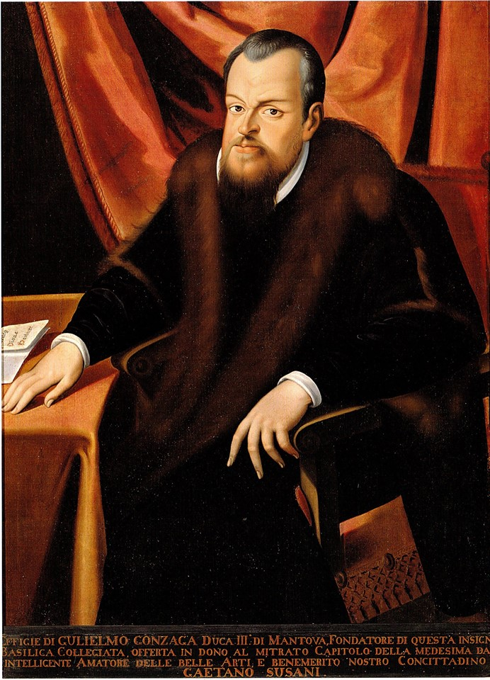 Портрет Гульельмо I Гонзага (1538-1587), герцога Мантуи и Монферрата